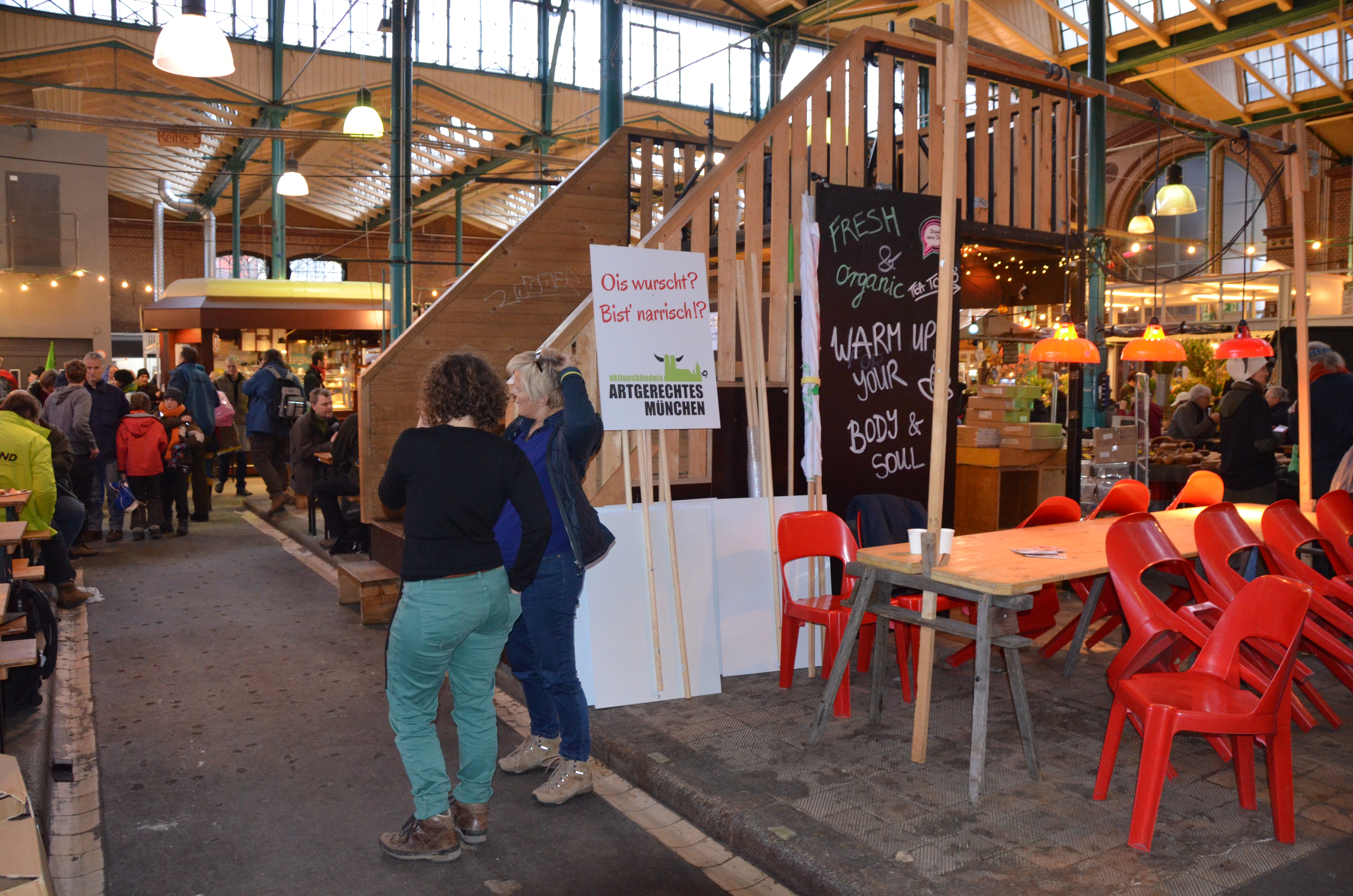 Wir haben es satt! (2016, Markthalle9 Demofrühstück)